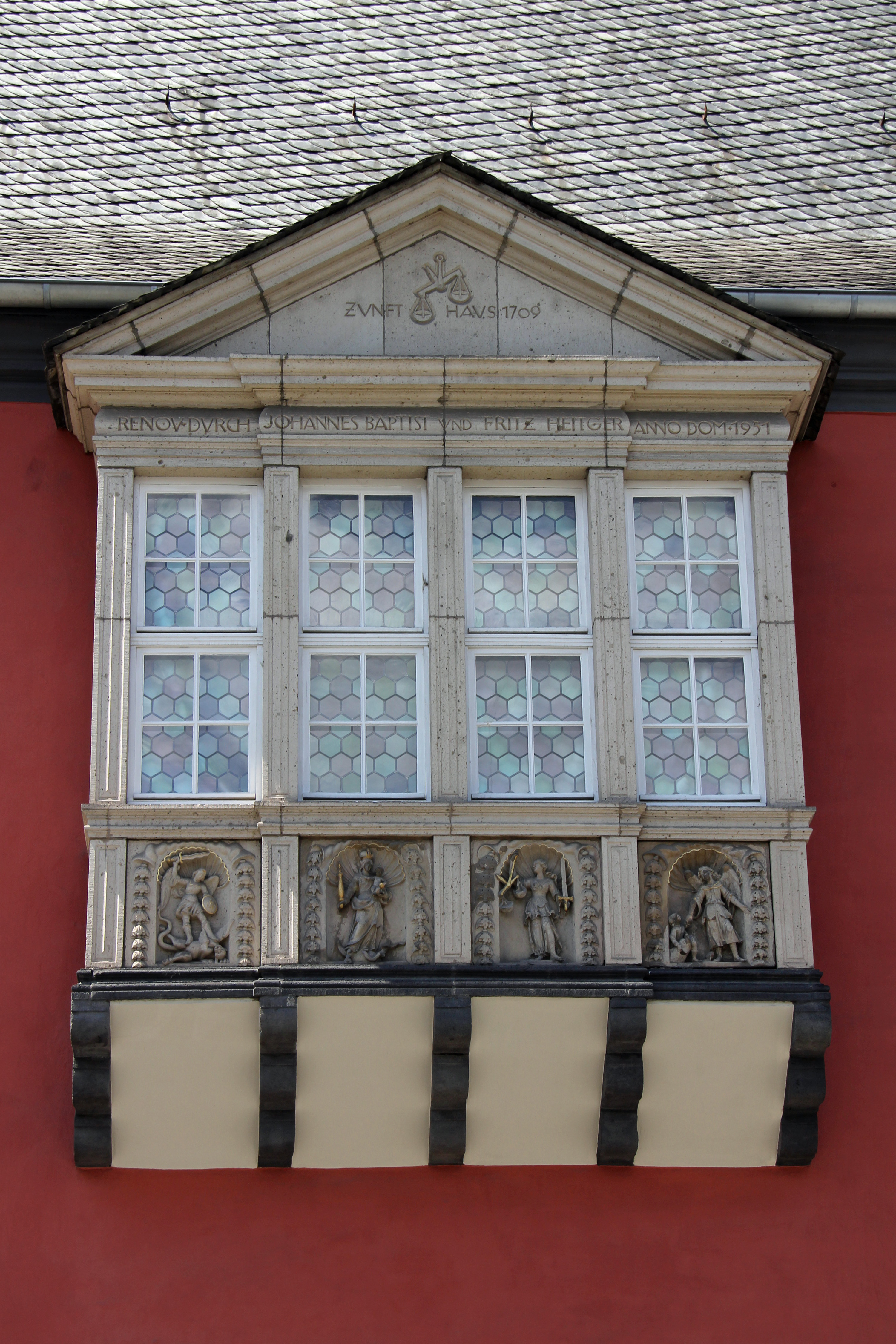 Koblenz im Buga-Jahr 2011 - Erker am Krämerzunfthaus